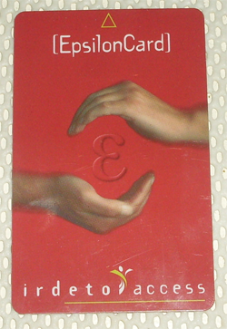 Smartcard Irdeto-2 (Epsilon Card)